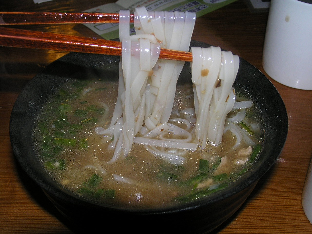 フォ